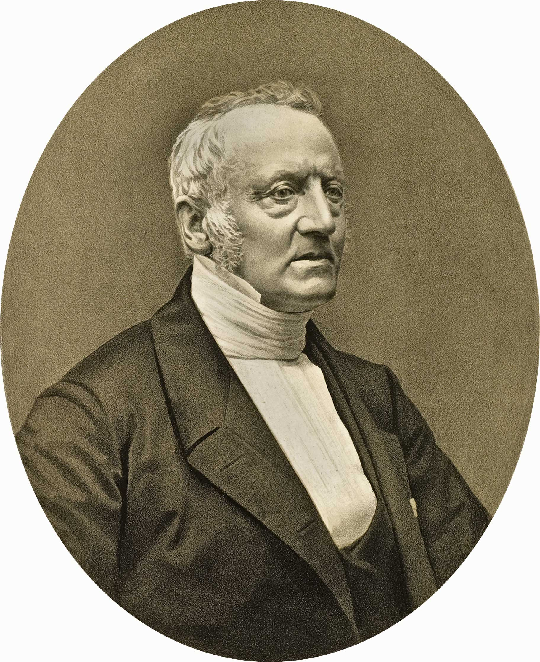 portret van de Groninger hoogleraar Hermannus Christiaan van Hall (1801-1874)